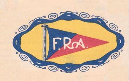 Logo Compania Franco-Romana de Navigație Aeriana